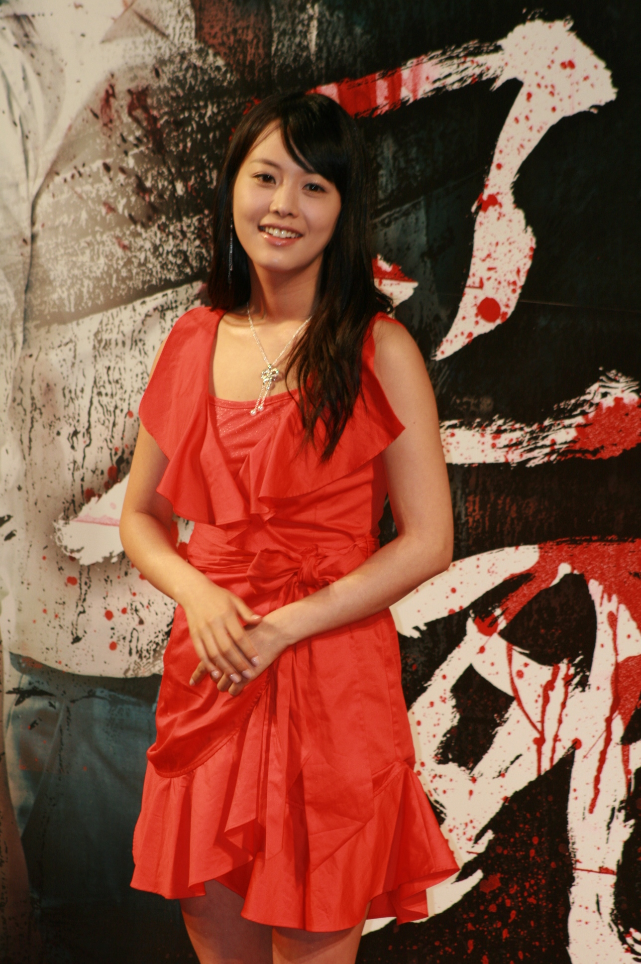 고사: 피의 중간고사 시사회